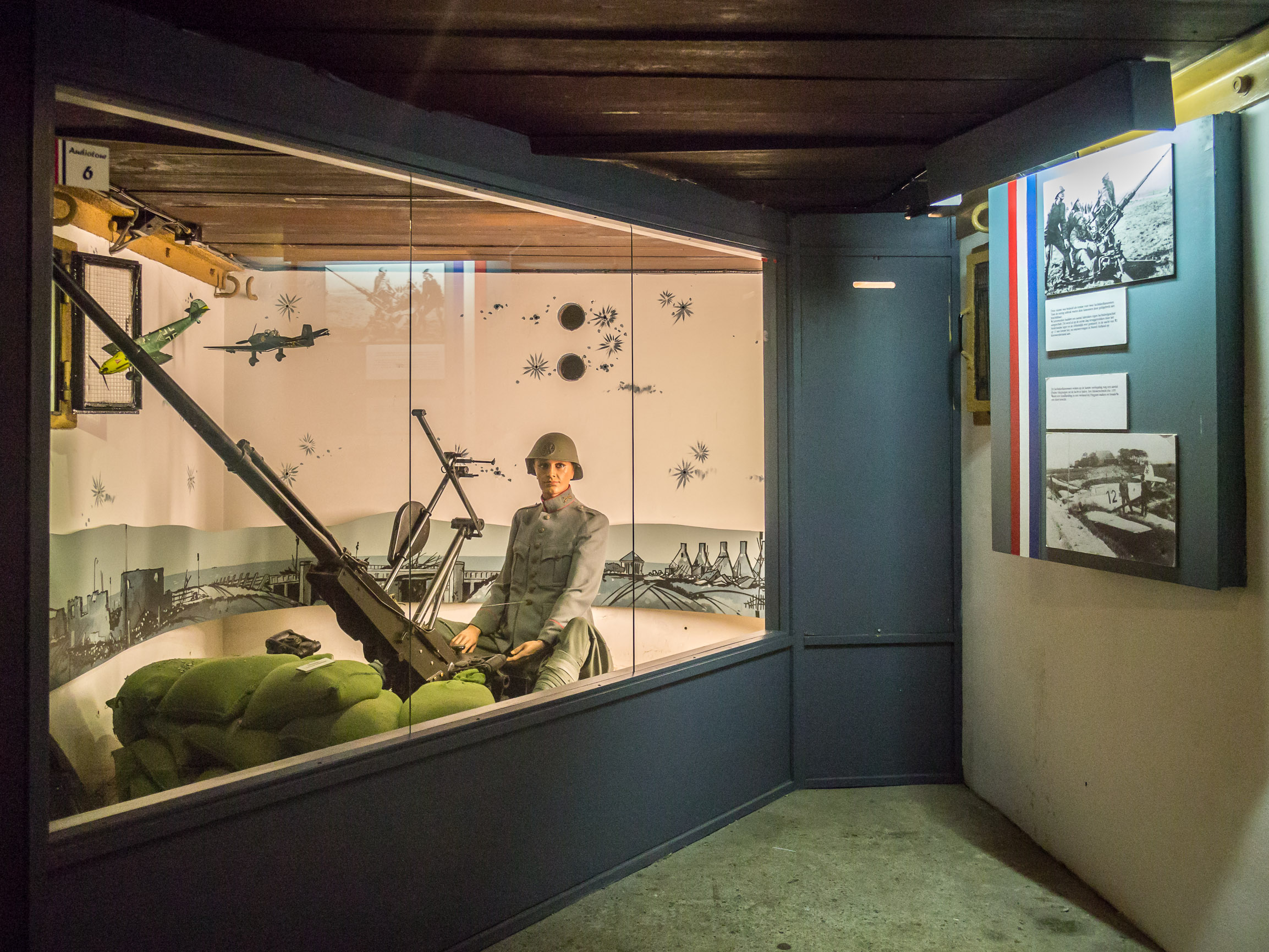 Kazemattenmuseum Kornwerderzand - Luchtafweergeschut